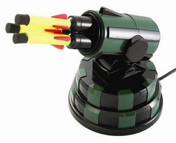 Dream Cheeky USB Missile Launcher